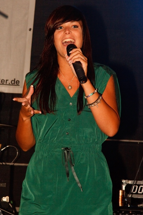 Jennifer Braun, Rewind - Unser Star für Oslo, Maximilianpark Hamm.